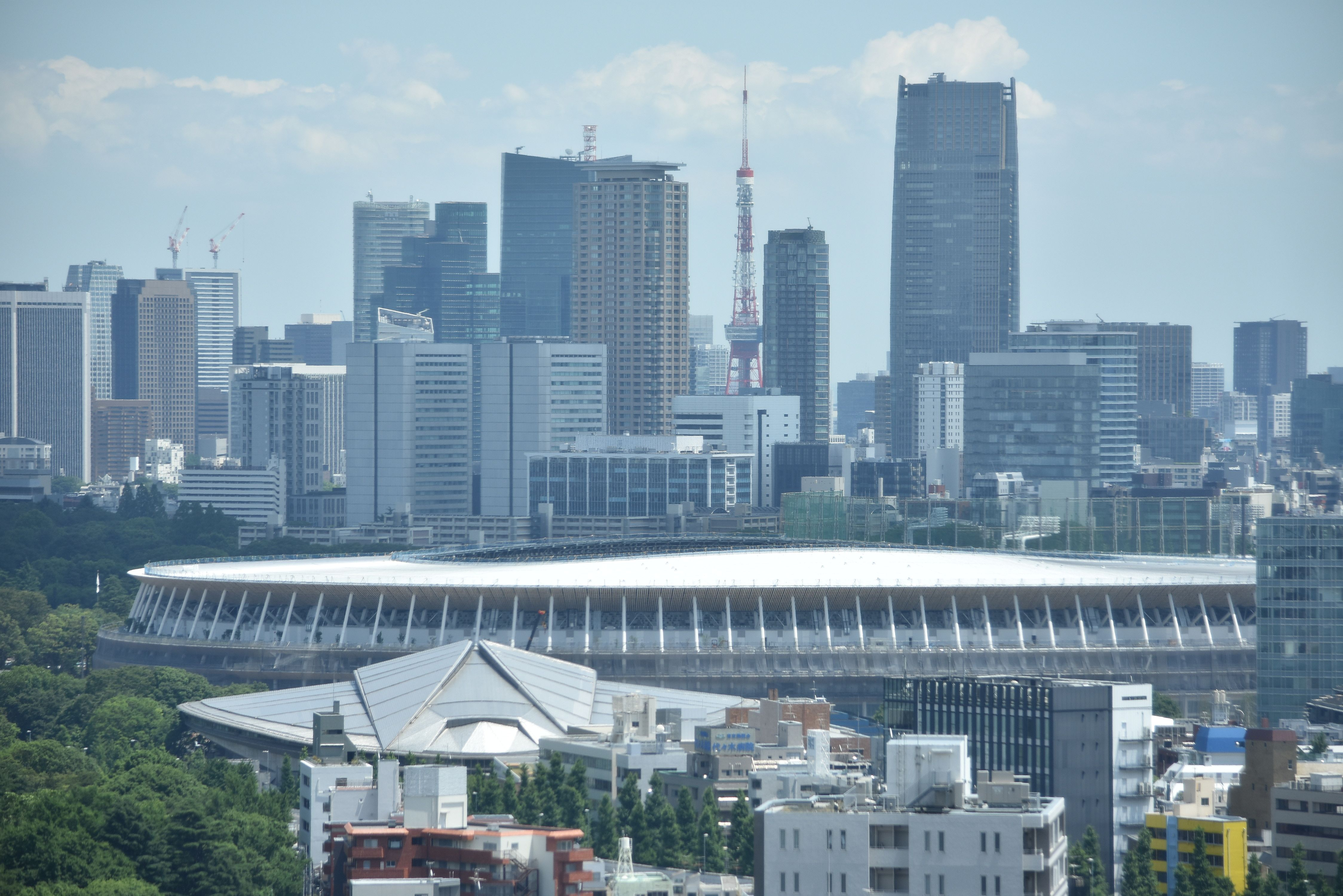 新国立競技場 !Nikon D3400